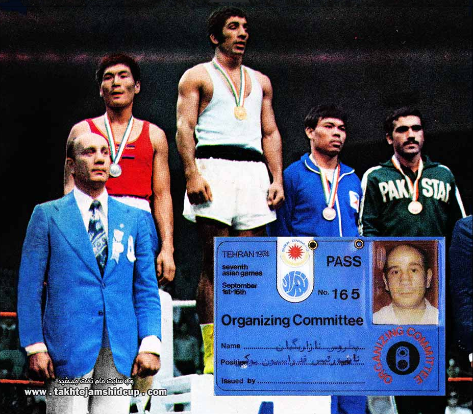 Boxing 71 kg podium, 1974 Asian Games in Tehran. L-r: Petros Nazarbegian, Jang Ho-ryon, Sharif Delaram, Nicolas Aquilino, Siraj-ud-Din